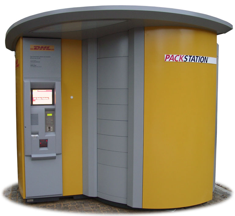 Eine DHL-Packstation GNU-FDL selbst fotografiert von KMJ